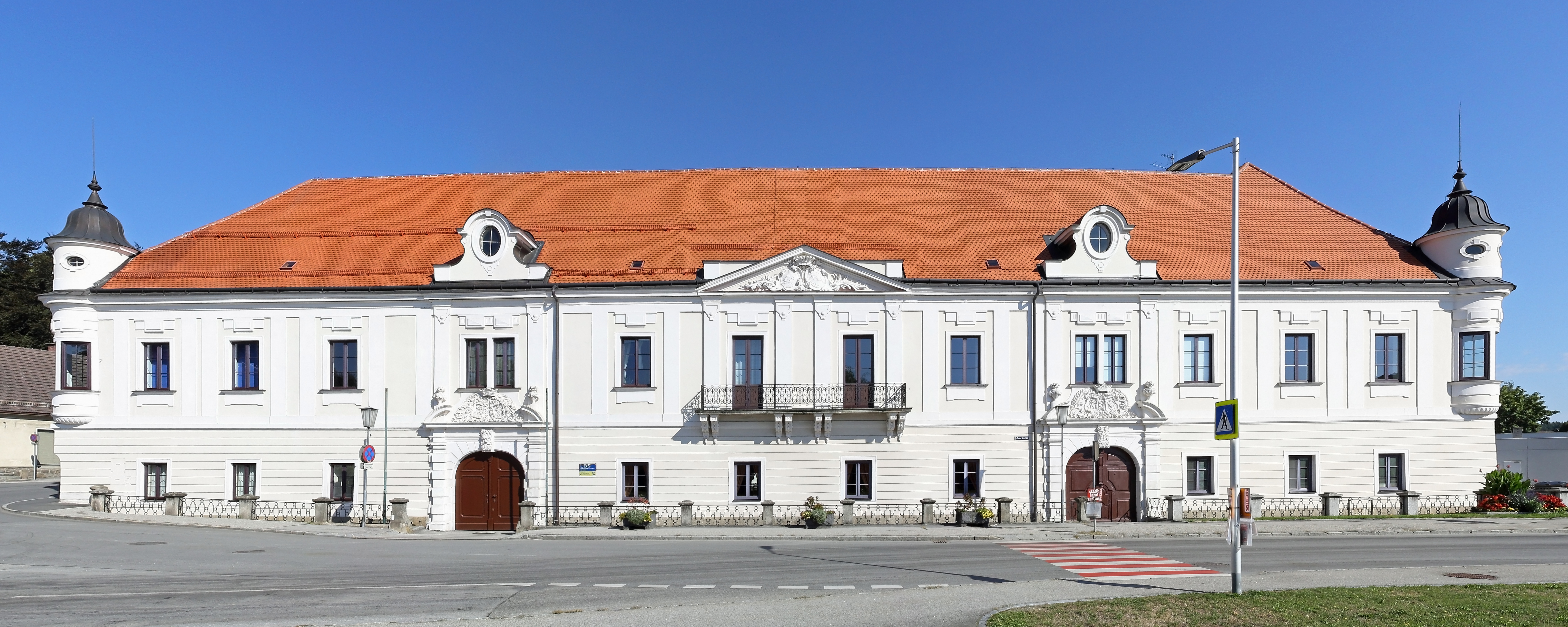 Das Schloss Schrems wurde 1635 erbaut. Nach einem Brand im Jahr 1777 wurde es 1781 neu errichtet. Seit 1951 dient das Schloss als Berufsschule.